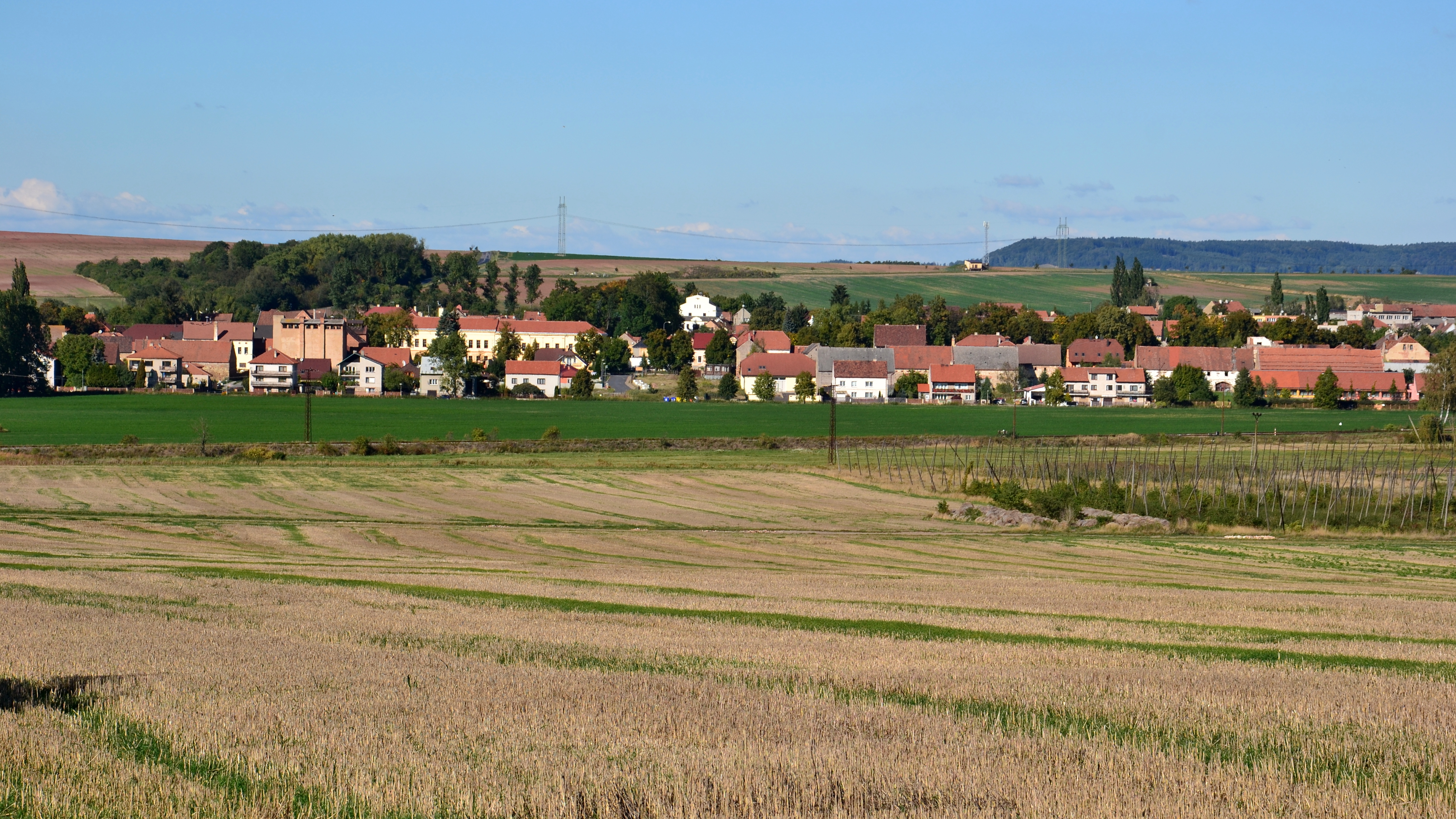 Pohled od jihu